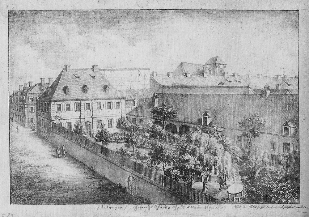 Erlangen. Das 1748 errichtete Lynckersches Palais (Friedrichstraße 35) von der Gartenseite aus, entlang der heutigen Fahrstraße. Heute befindet sich in dem Haus die Städtische Sing- und Musikschule Erlangen.